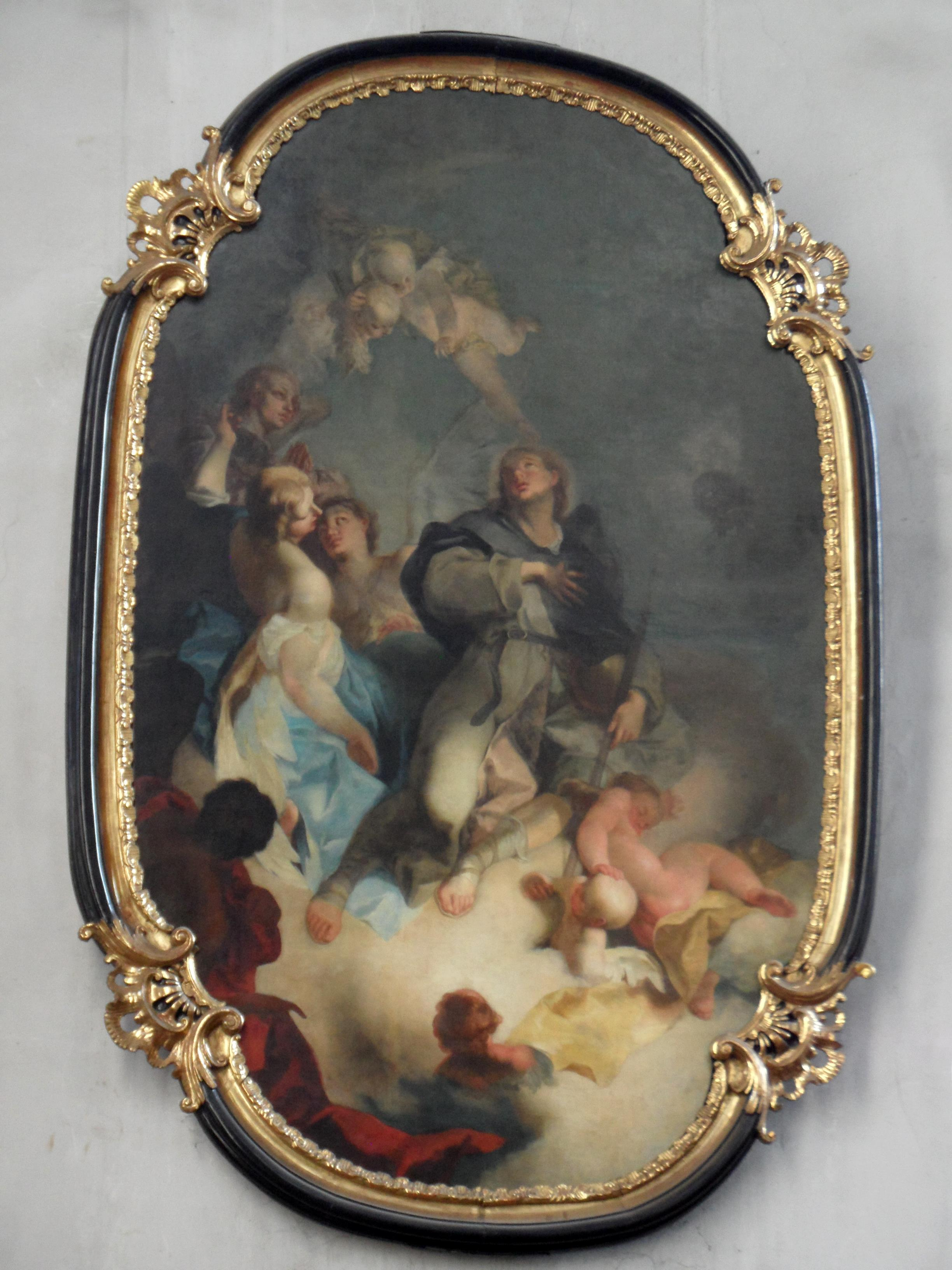 Obraz Apoteóza sv. Jakuba, František Antonín Palko (1756), původně na hlavním oltáři - kostel sv. Jakuba, Brno